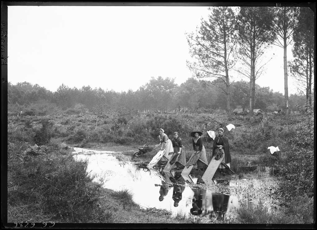 Reproduction numérique d'une plaque de verre réalisée par Félix Arnaudin, matièreː verre, technique négatif